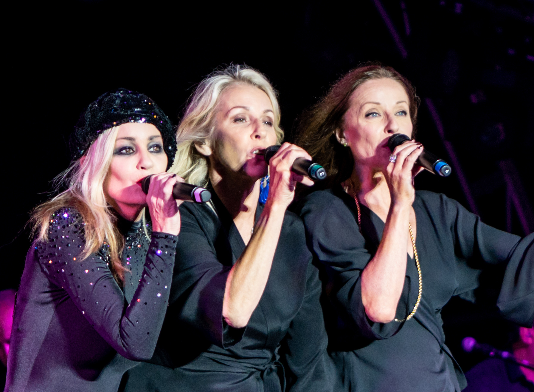 BanaRamaAmpthill290618-22